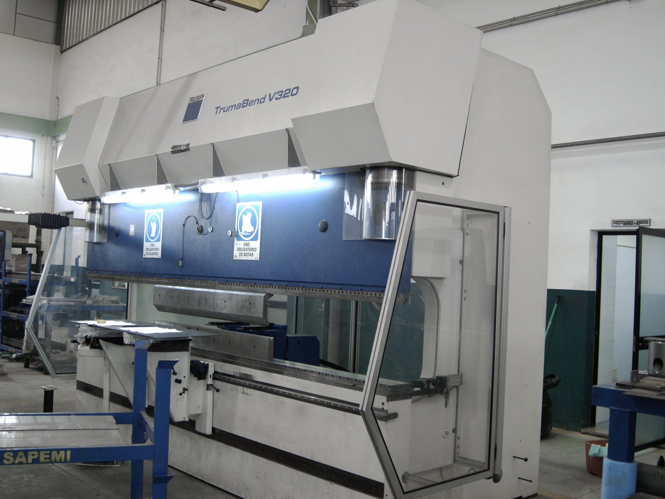 Plegadora de chapa por control numérico en Mipesa